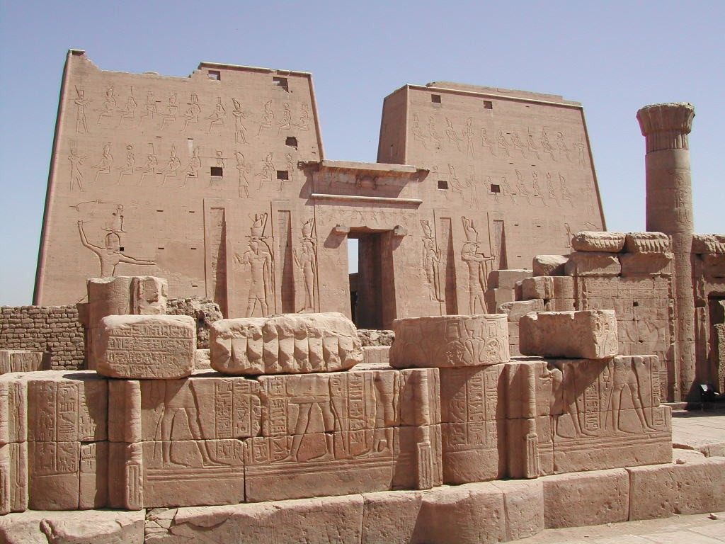 Egypten - Horus-Tempel vun Edfu.